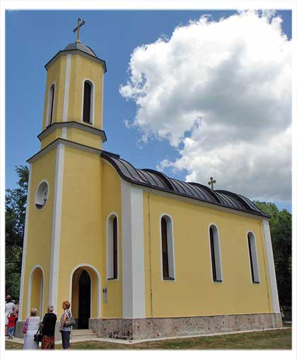 Црква Светог великомученика Георгија у Стогу.